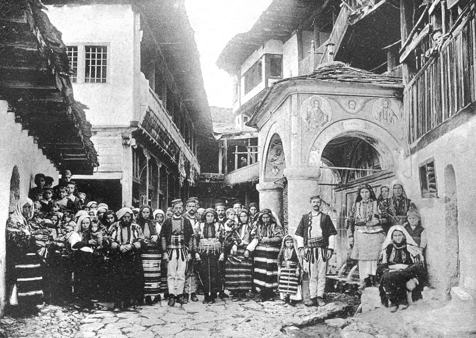 Поклонници в манастира "Свети Йоан Предтеча" в началото на ХХ век. Фотограф Г. Трайчев. От: Албума "Бигорския монастир "Св. Иван Предтеча", София б.д..